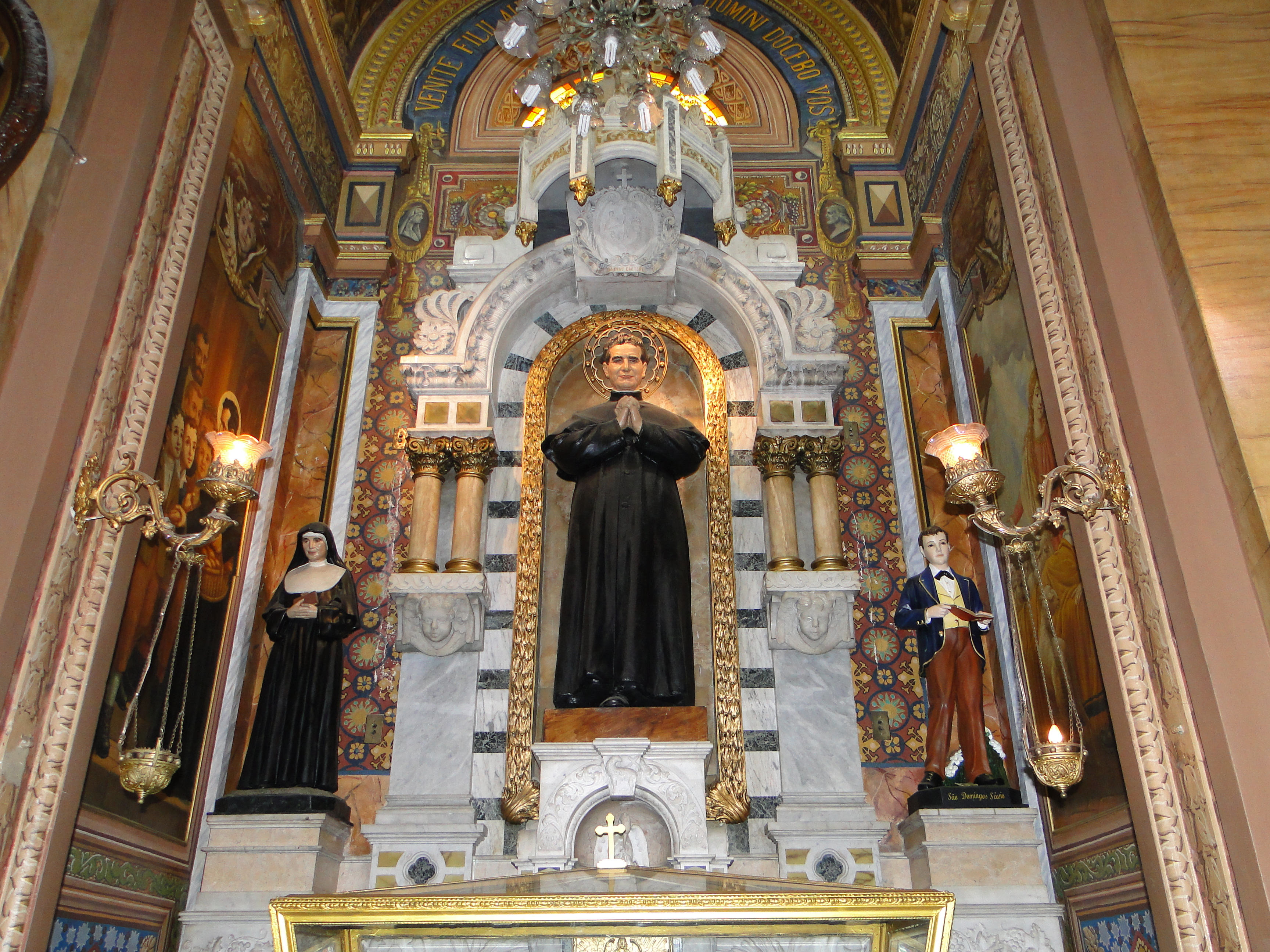 Altar de Dom Bosco na nave lateral esquerda do Santuário do Sagrado Coração de Jesus, em São Paulo (SP), Brasil.